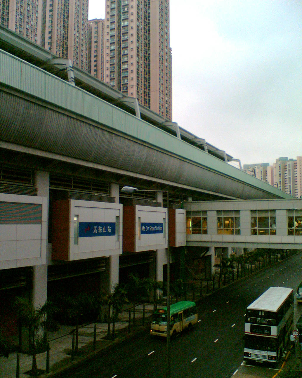 馬鞍山鐵路馬鞍山站